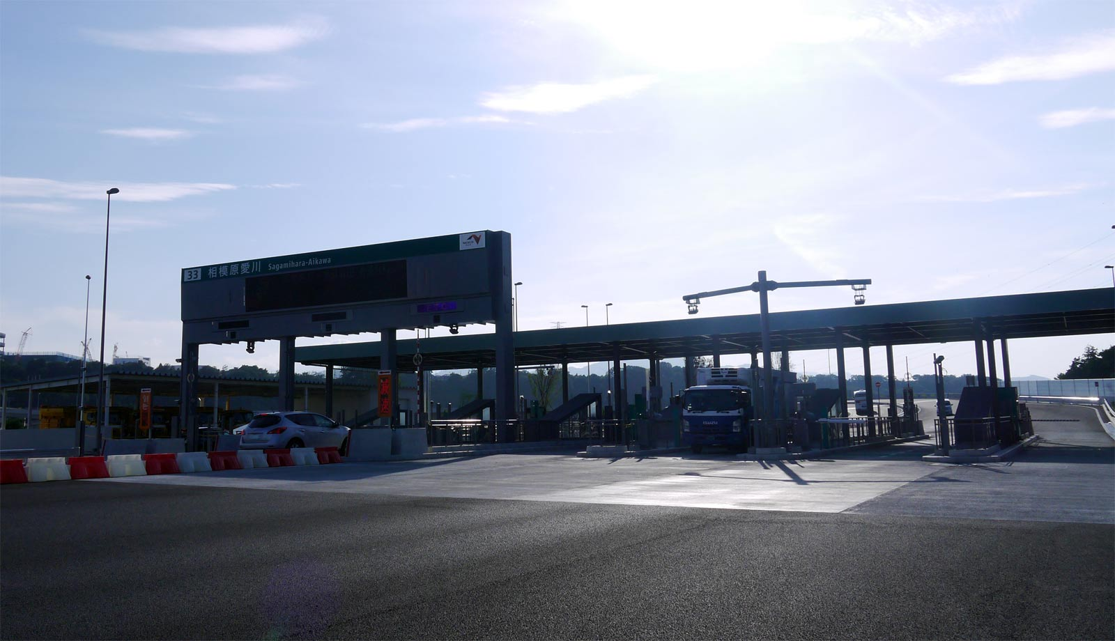 圏央道相模原相川IC